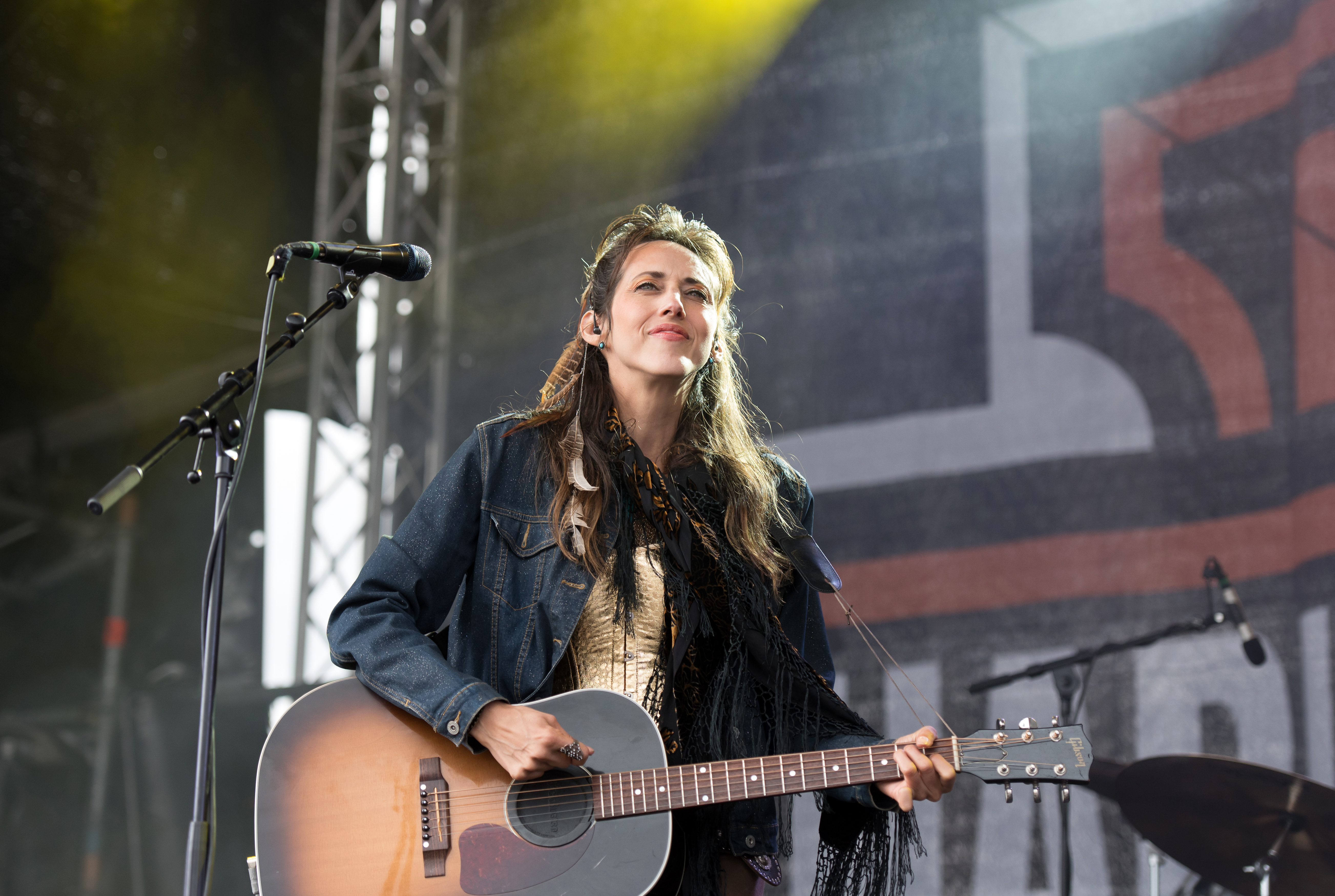 Patricia Yonne bei den Hamburg Harley Days 2017